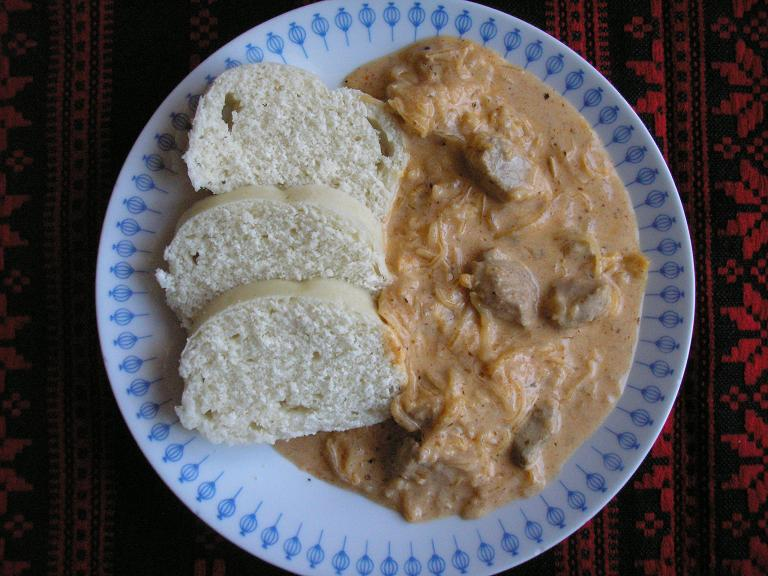 segedinsky gulas